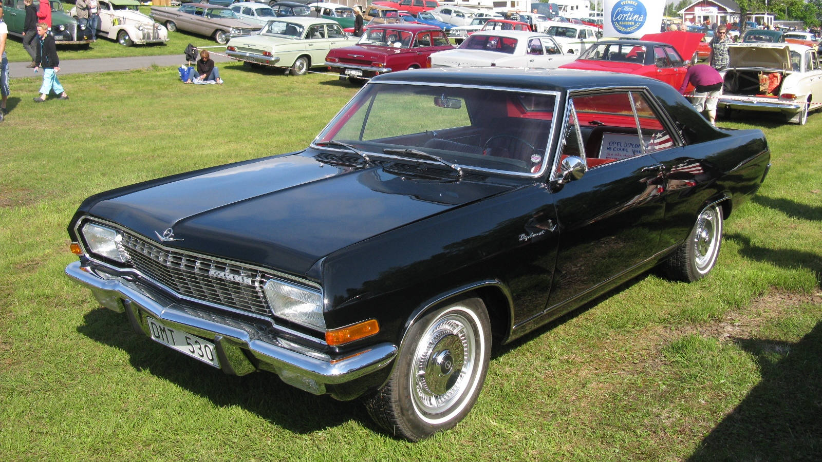 Opel Diplomat V8 Coupé